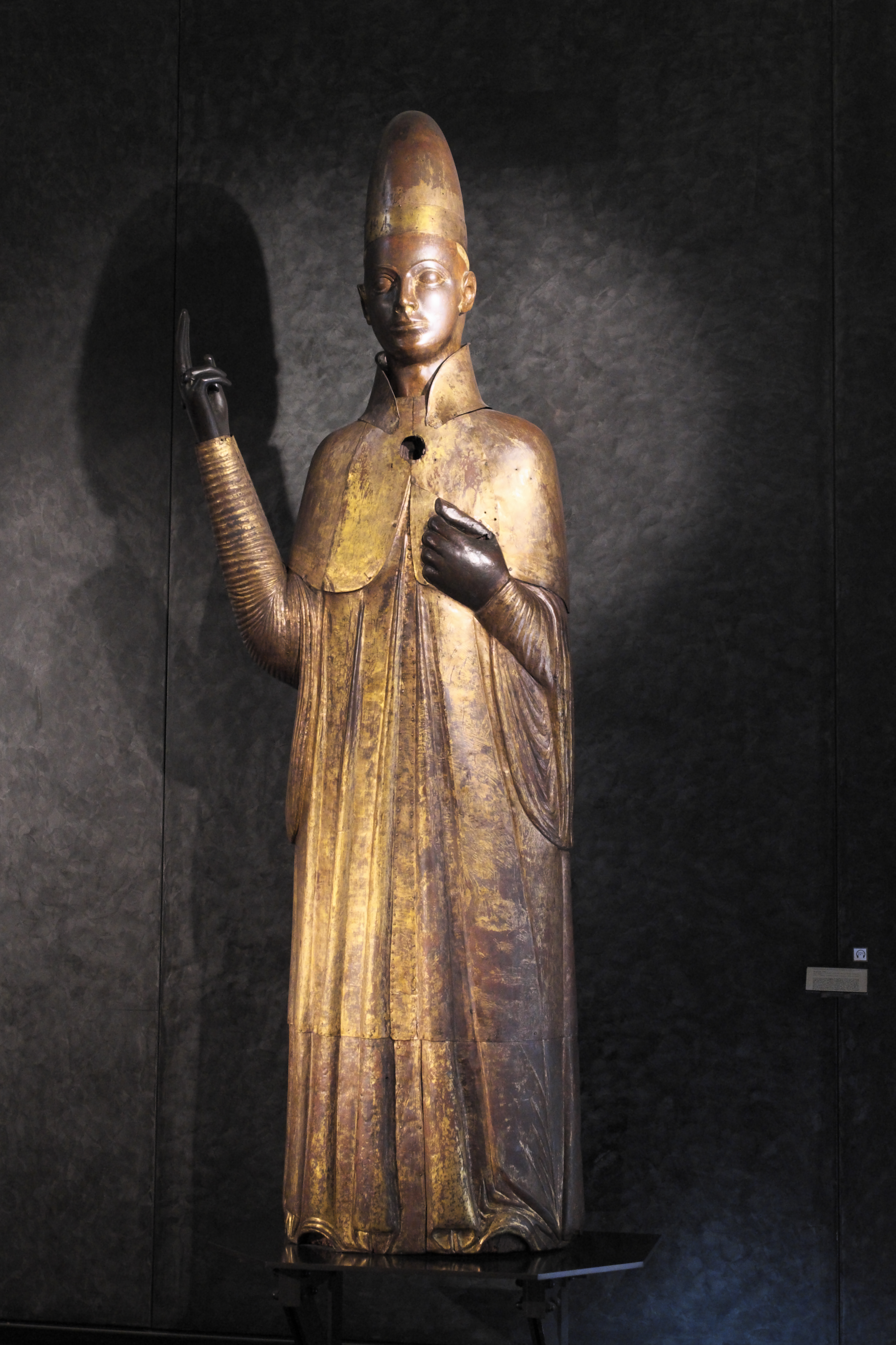 Museo civico medievale in Bologna (Emilia-Romagna/Italien), Skulptur des Papstes Bonifatius VIII.